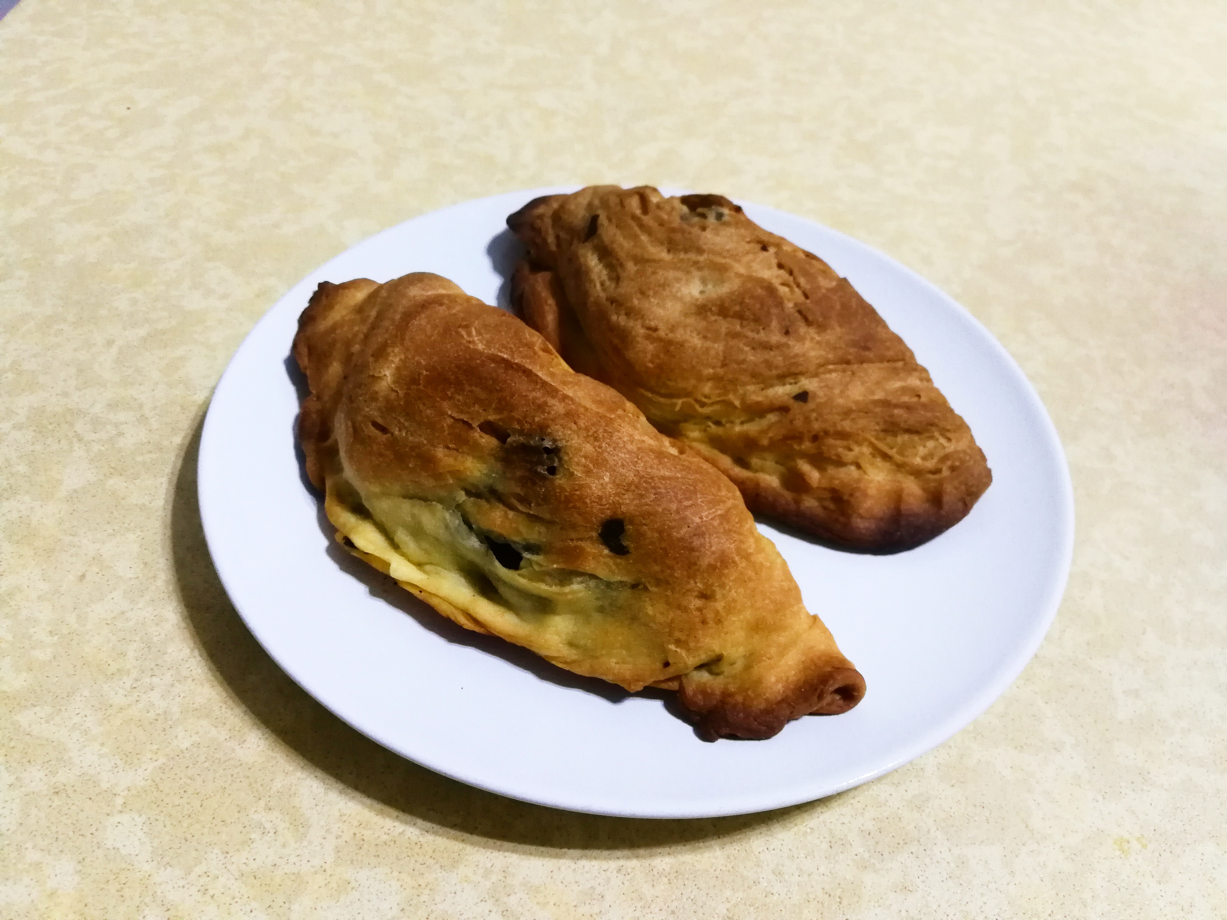 Piruni niscemesi fatti in casa